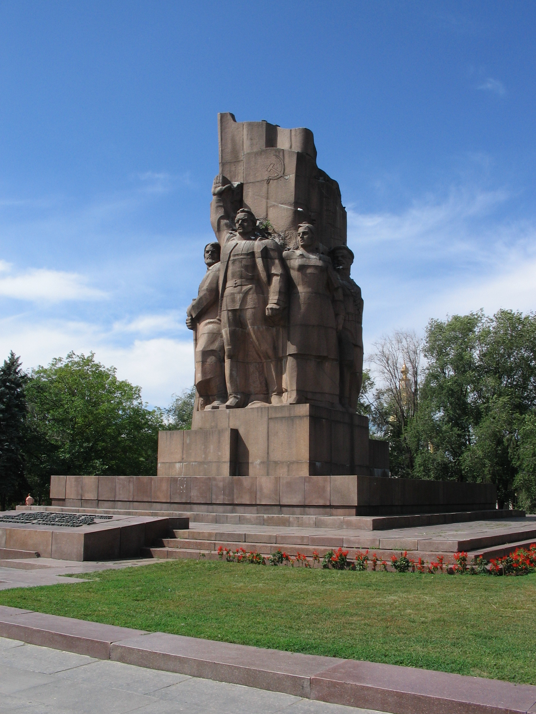 Монумент на честь проголошення Радянської влади на Україні 1917 р. ск. Агібалов В.І., Овсянкін М.Ф., Рик Я.Й. худ. Свєтлорусов С.Г. арх. Алфьоров І.О. Максименко О.О. Черкасов Е.Ю. 1975 р.